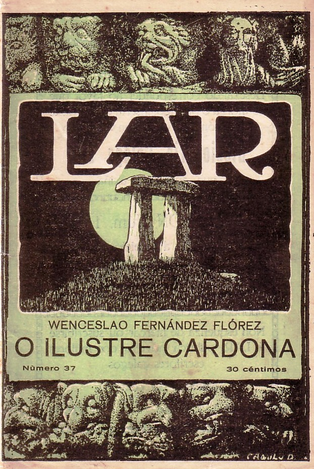 37 O ilustre Cardona. Wenceslao Fernández Flórez. Lar. 1927.jpg